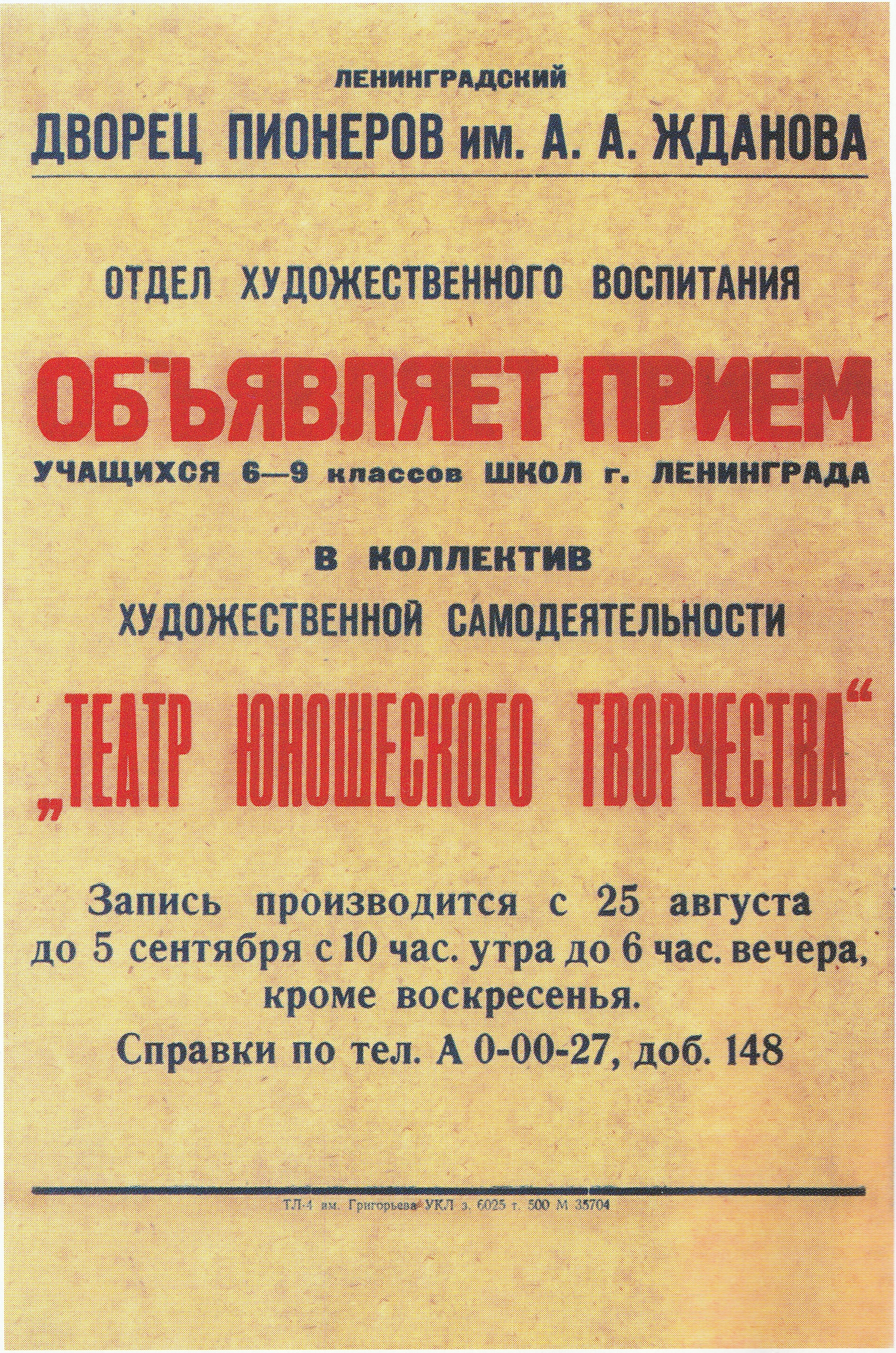 Плакат о приёме в ТЮТ